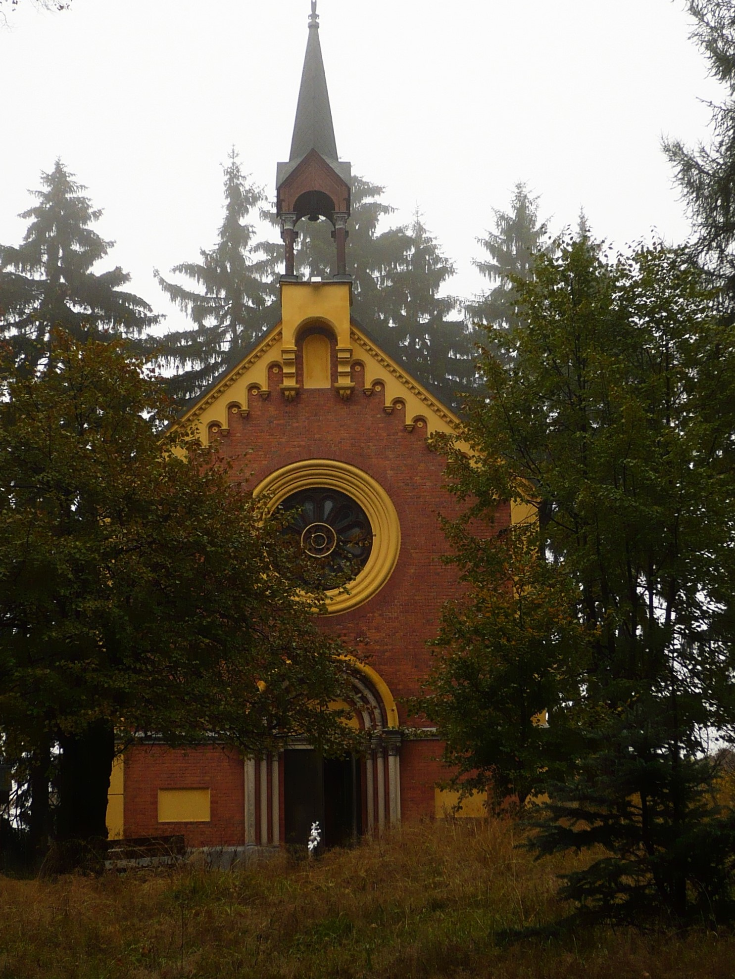 Sokołowsko. Kościół